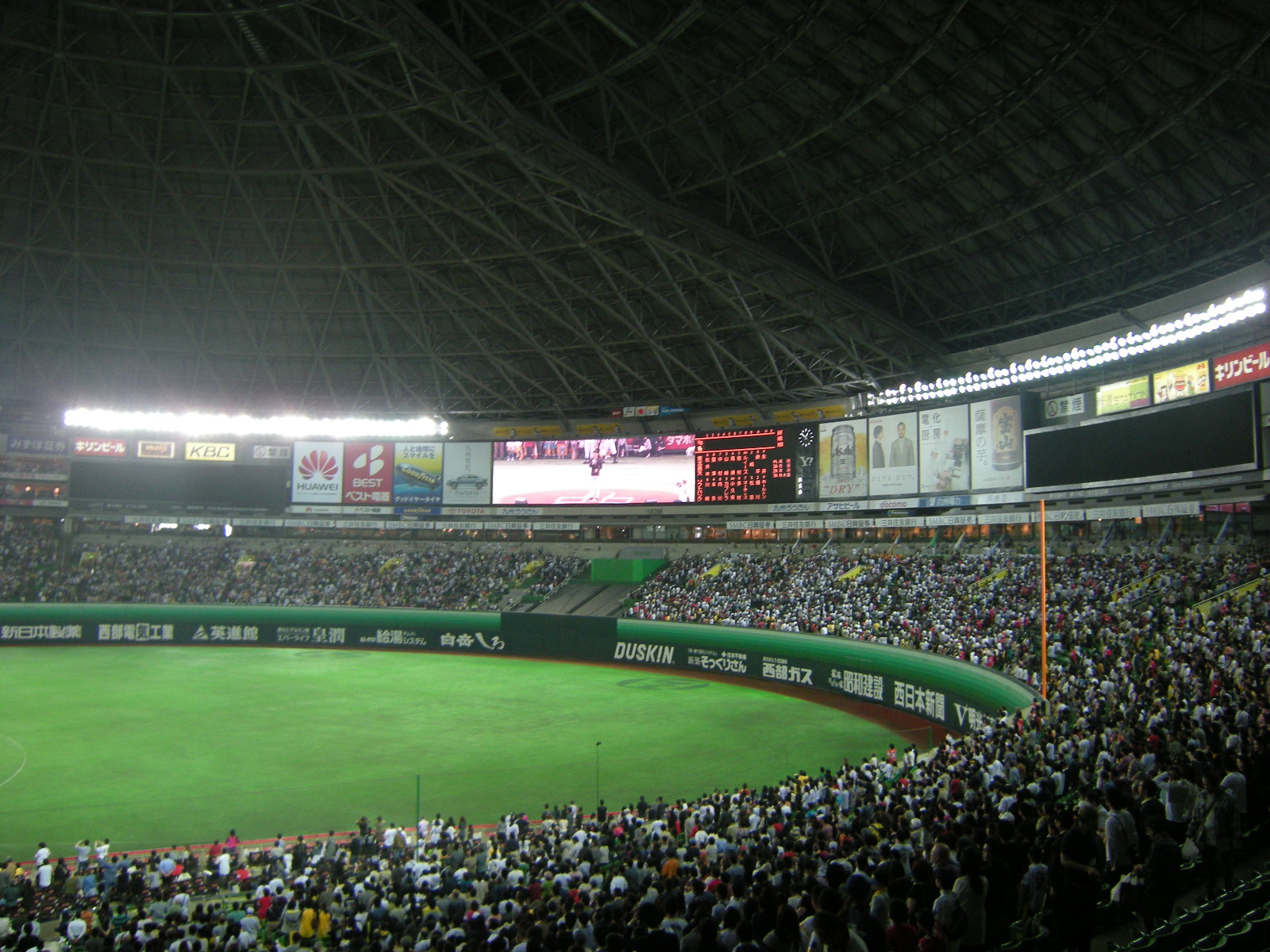 2011年5月4日のソフトバンク対楽天戦の試合前に撮影。